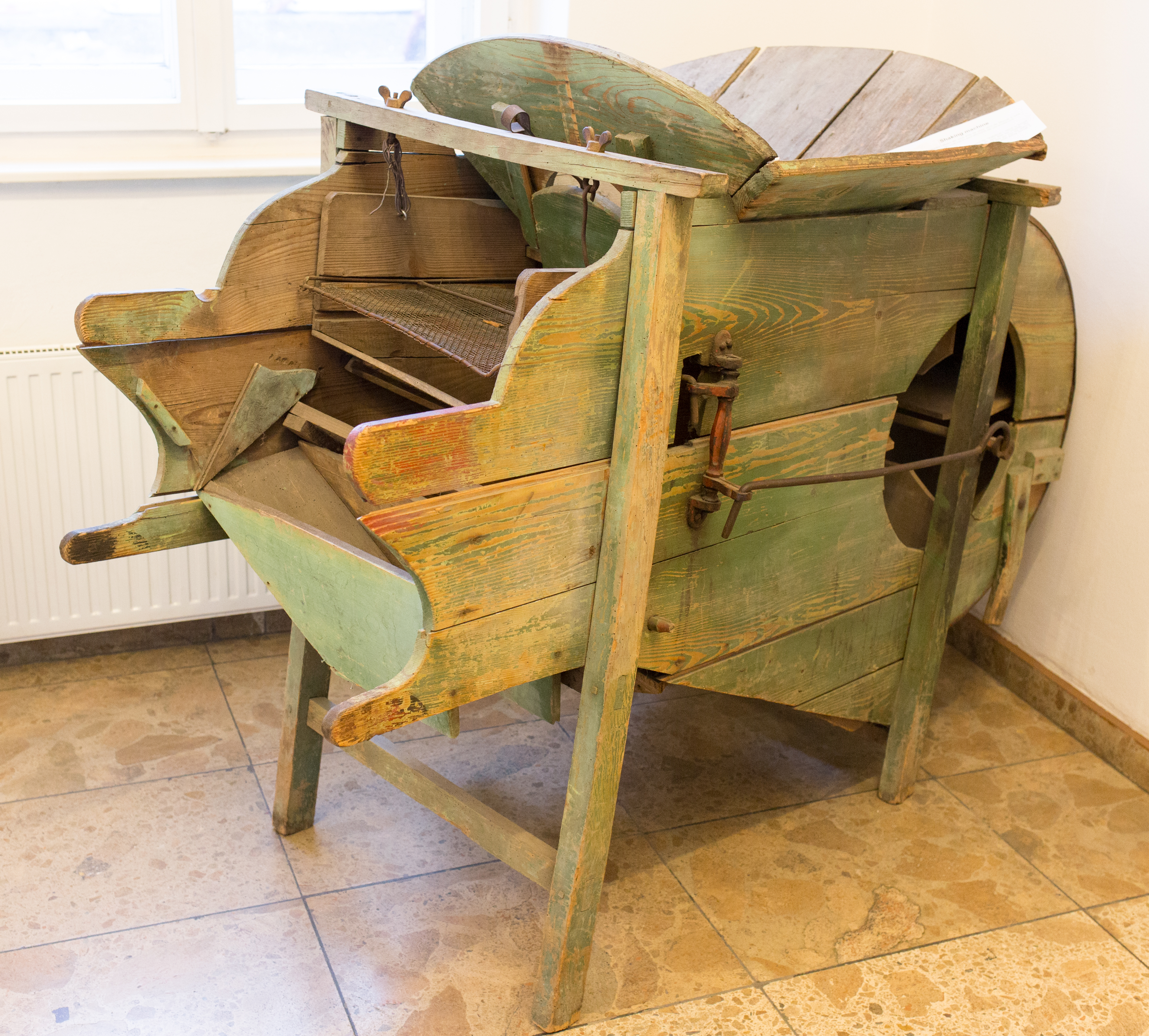 Schüttelmaschine (Landwirtschaft), wird im Hanfanbau verwendet. Bestand des Hanfmuseum